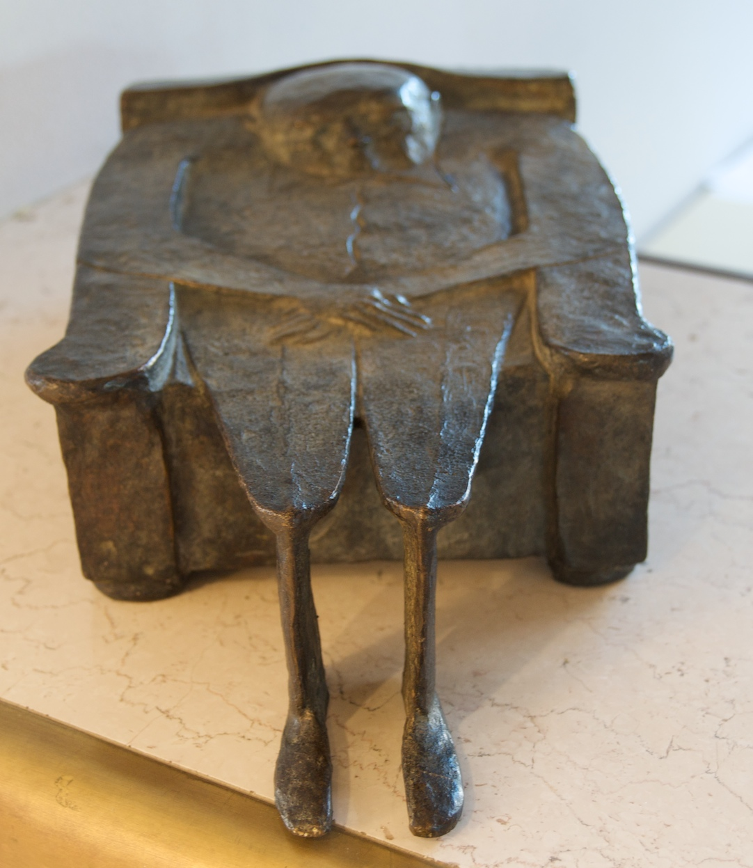 Afgeplatte rechthoekige fauteuil met lui mannetje